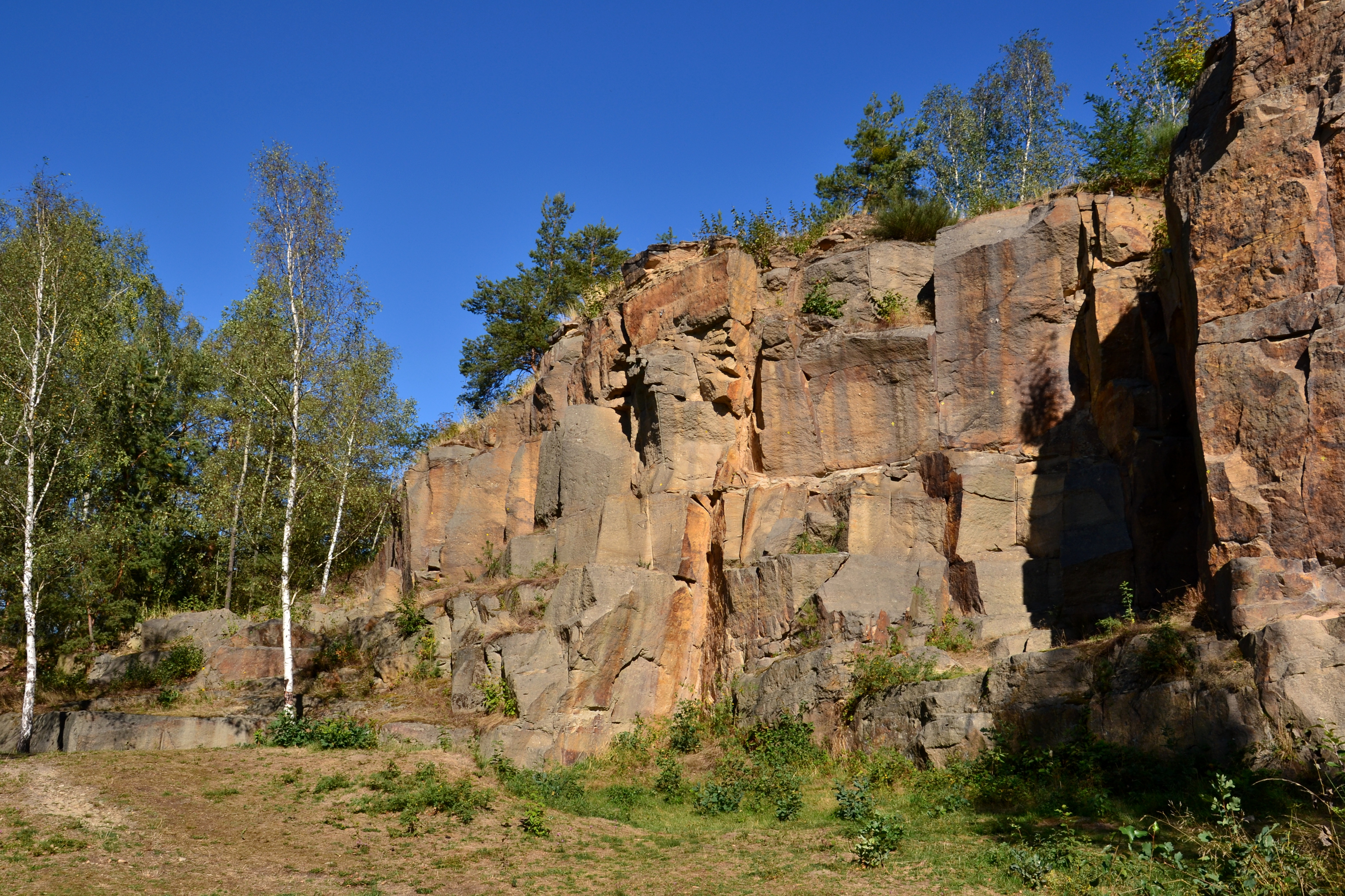 Lomová stěna